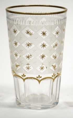 Seltersglas ur Serien Odelberg, tillverkad vid Kosta Glasbruk från 1896.